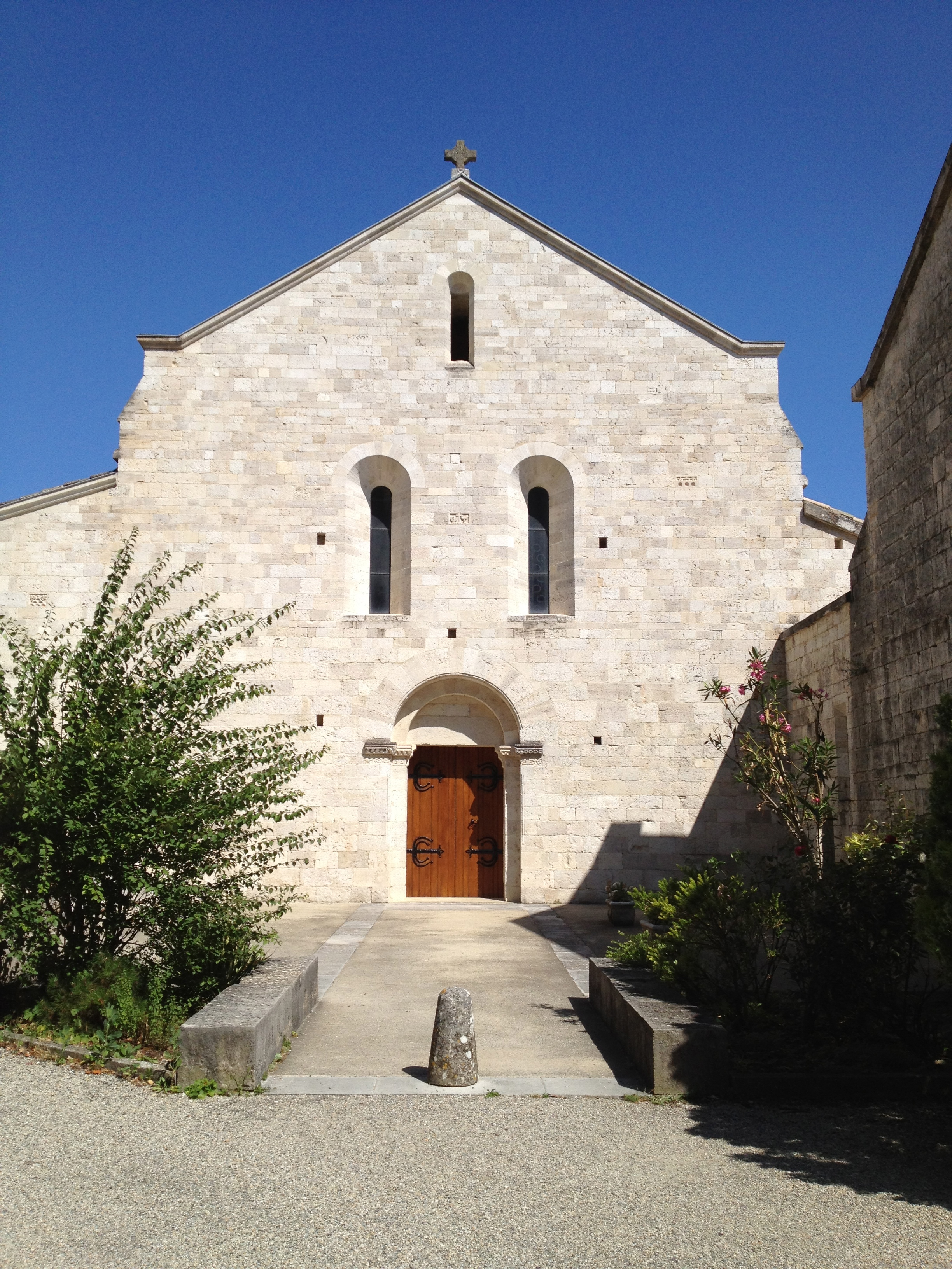 Abbaye Notre-Dame d'Aiguebelle, Montjoyer, Drôme, France